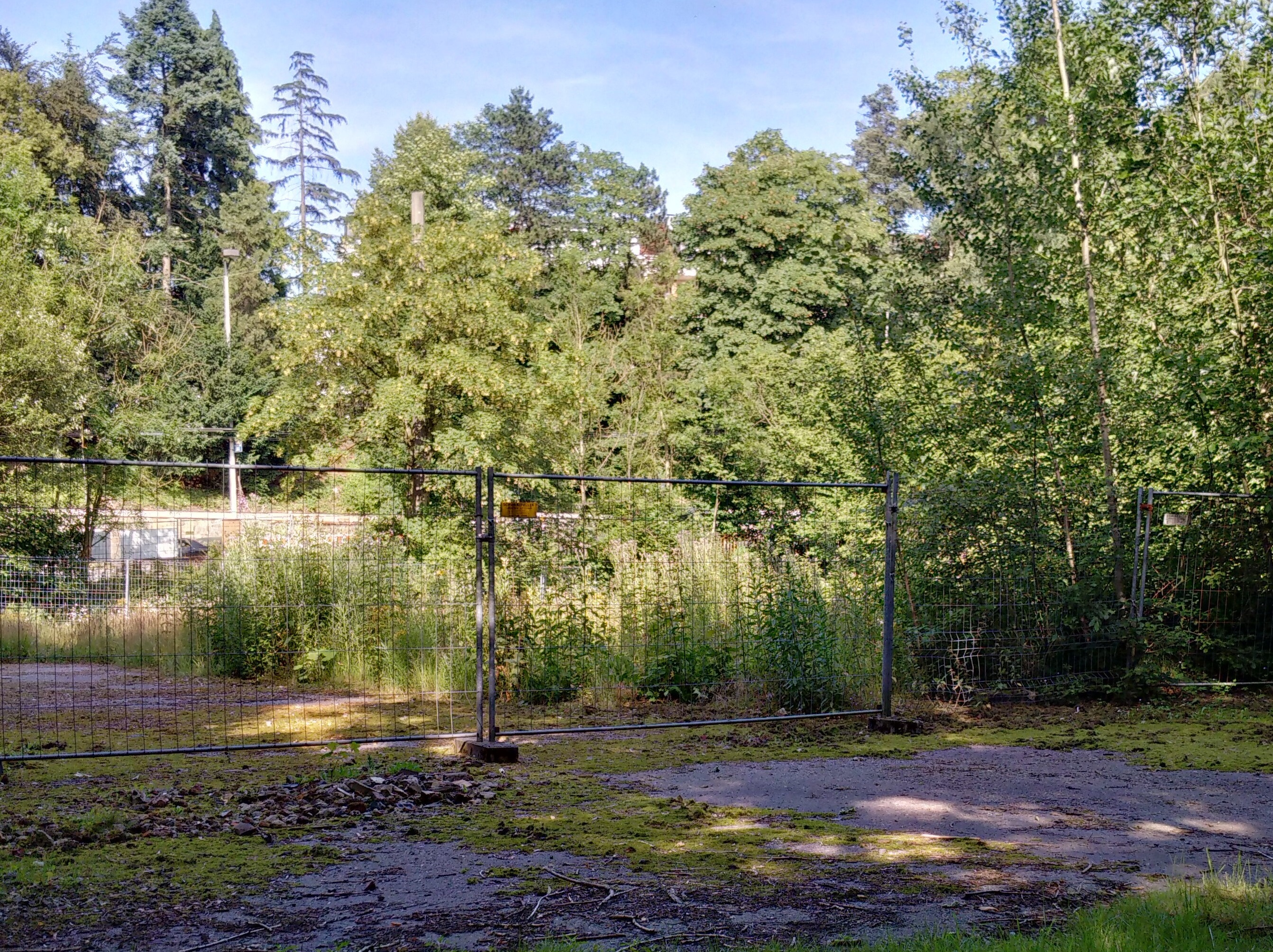 Brachfläche Bahnhof Solingen-Gräfrath, aufgenommen im Sommer 2016